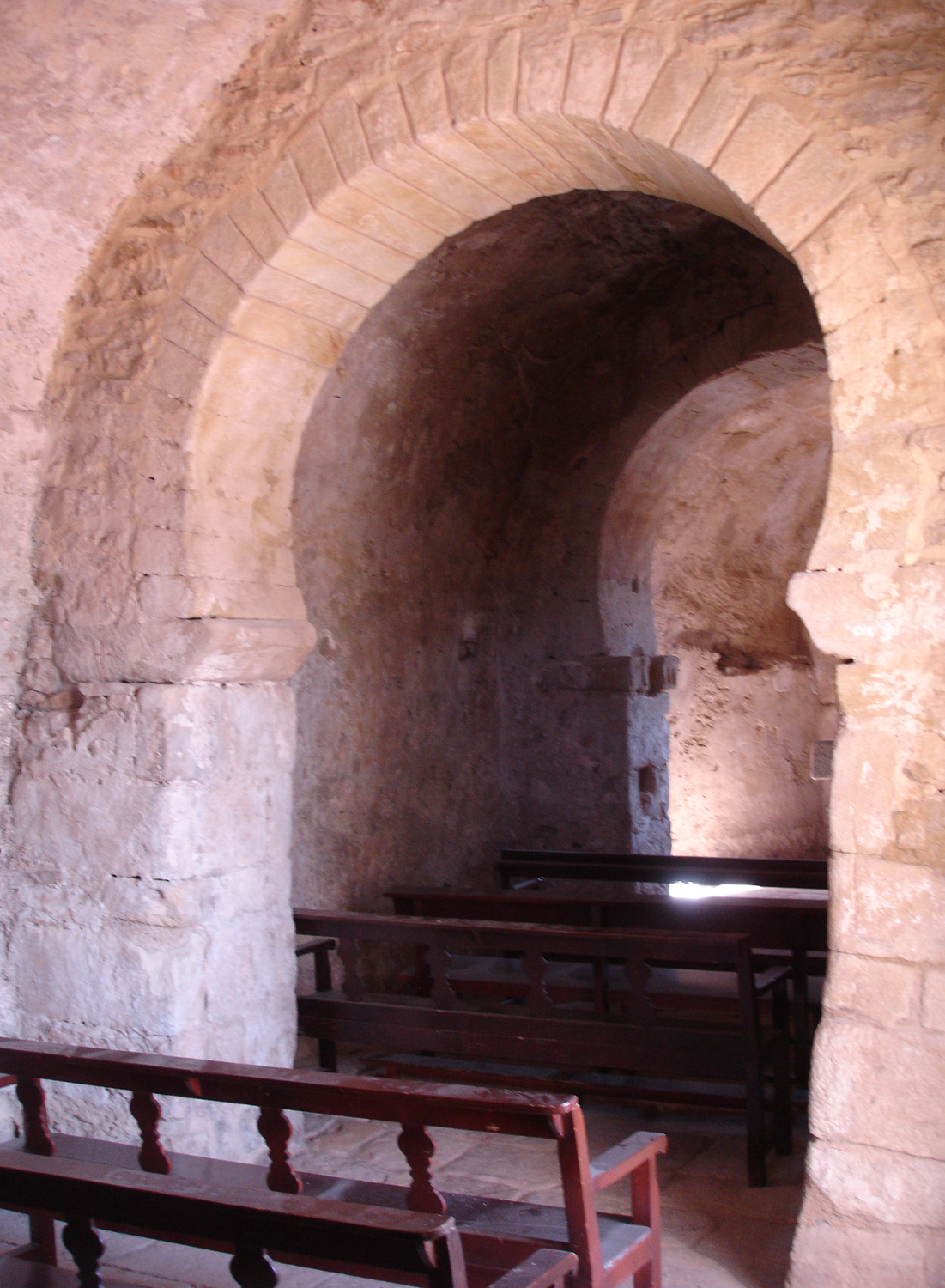 Eglesia de Sant Julià de Boada (Girona, Catalunya, Espanya) - Vista interior